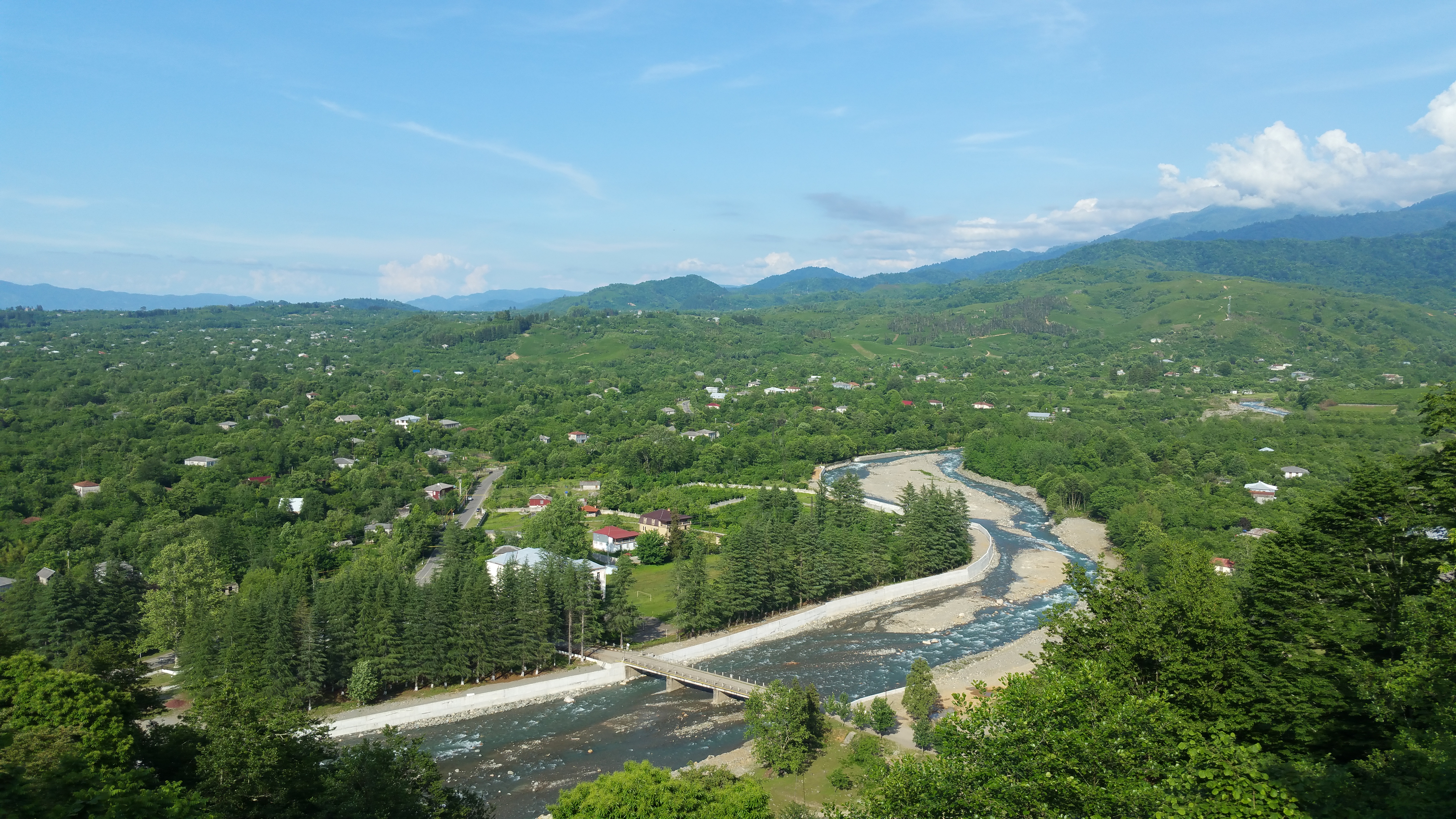 სოფელ შემოქმედის და მდინარე ბჟუჟის ხედი შემოქმედის მონასტრიდან, ოზურგეთის მუნიციპალიტეტი, გურია